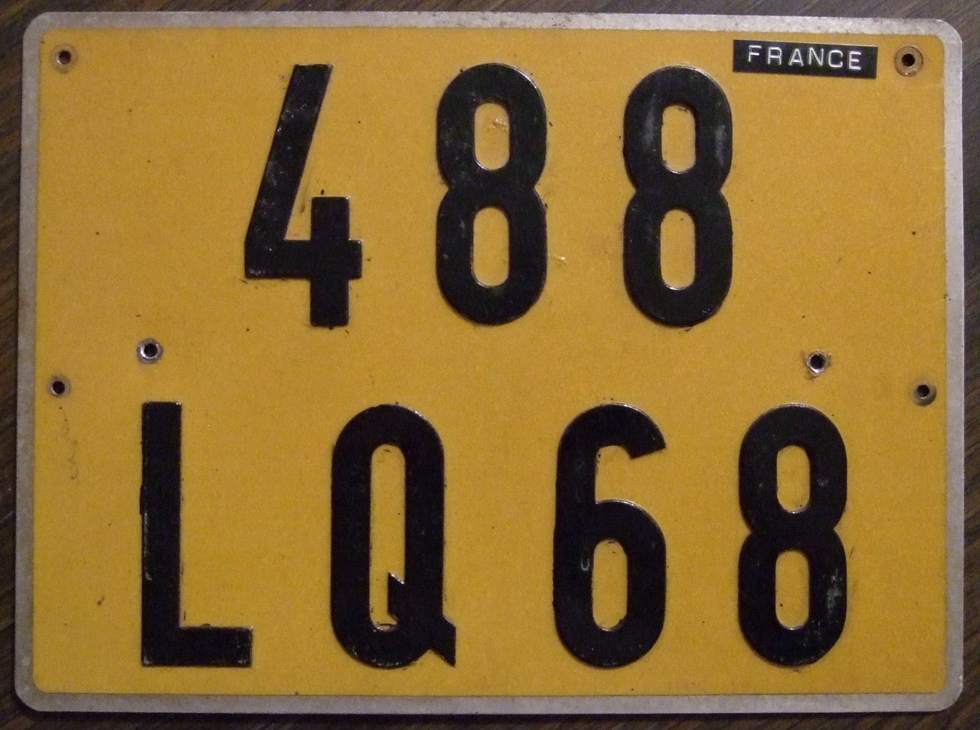 FRANCE square style passenger plate